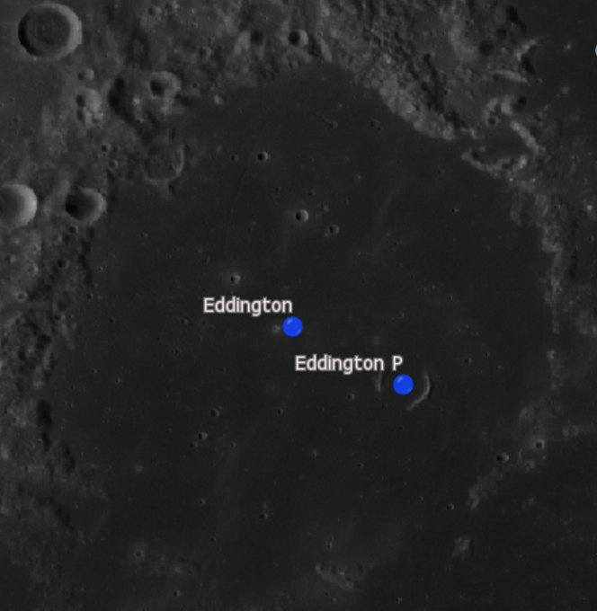 Cráter lunar Eddington. Cráteres satélite (Imagen LROC)